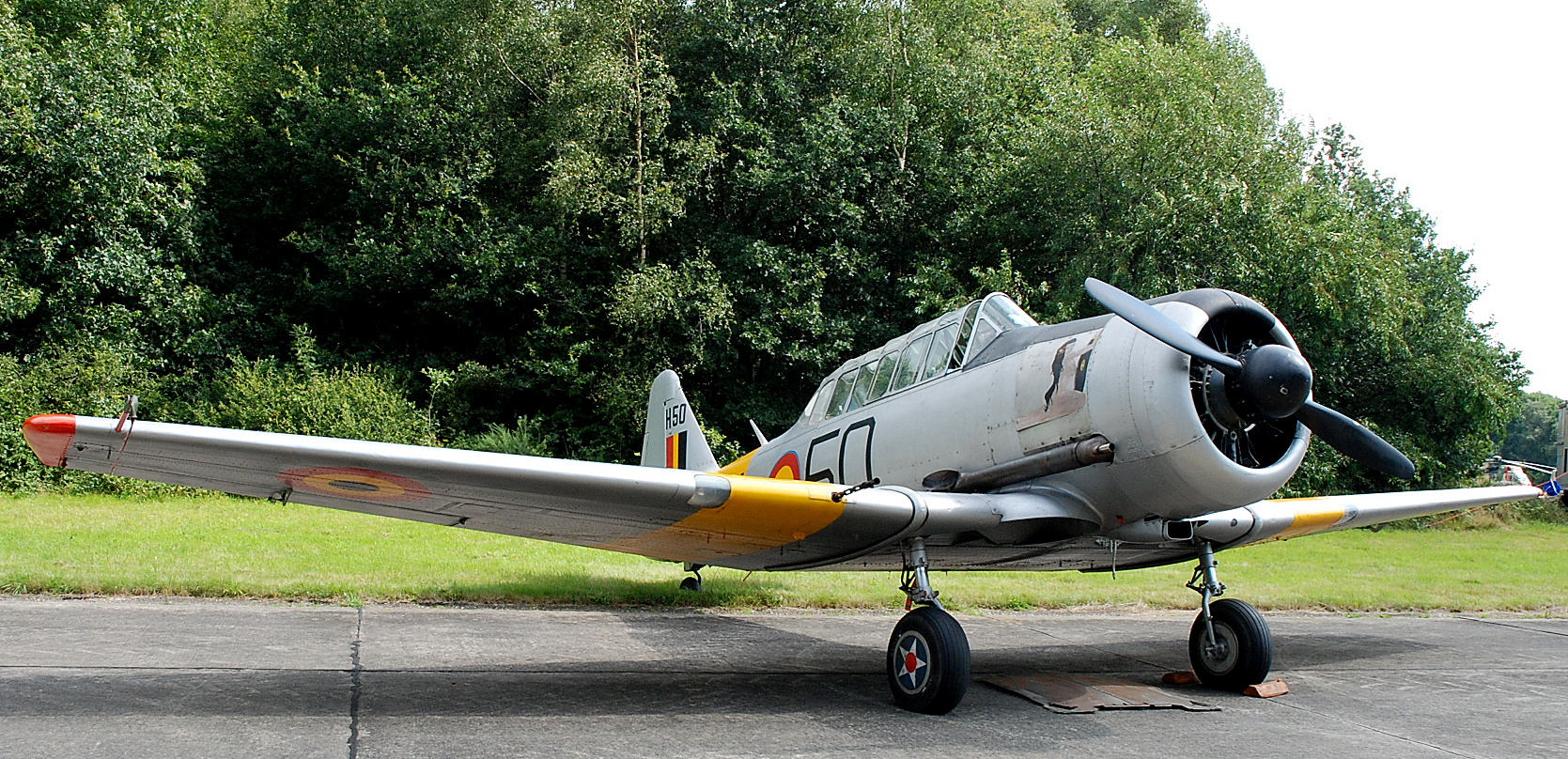 T6 Harvard Mk 4 tijdens een statische show op het vliegveld van Ursel, België